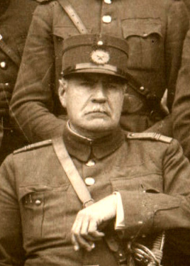 Generalul Aristide Razu comandant al Diviziilor 5 şi 22 Infanterie, România, în Primul Război Mondial (aici intr-o poză din 1929)